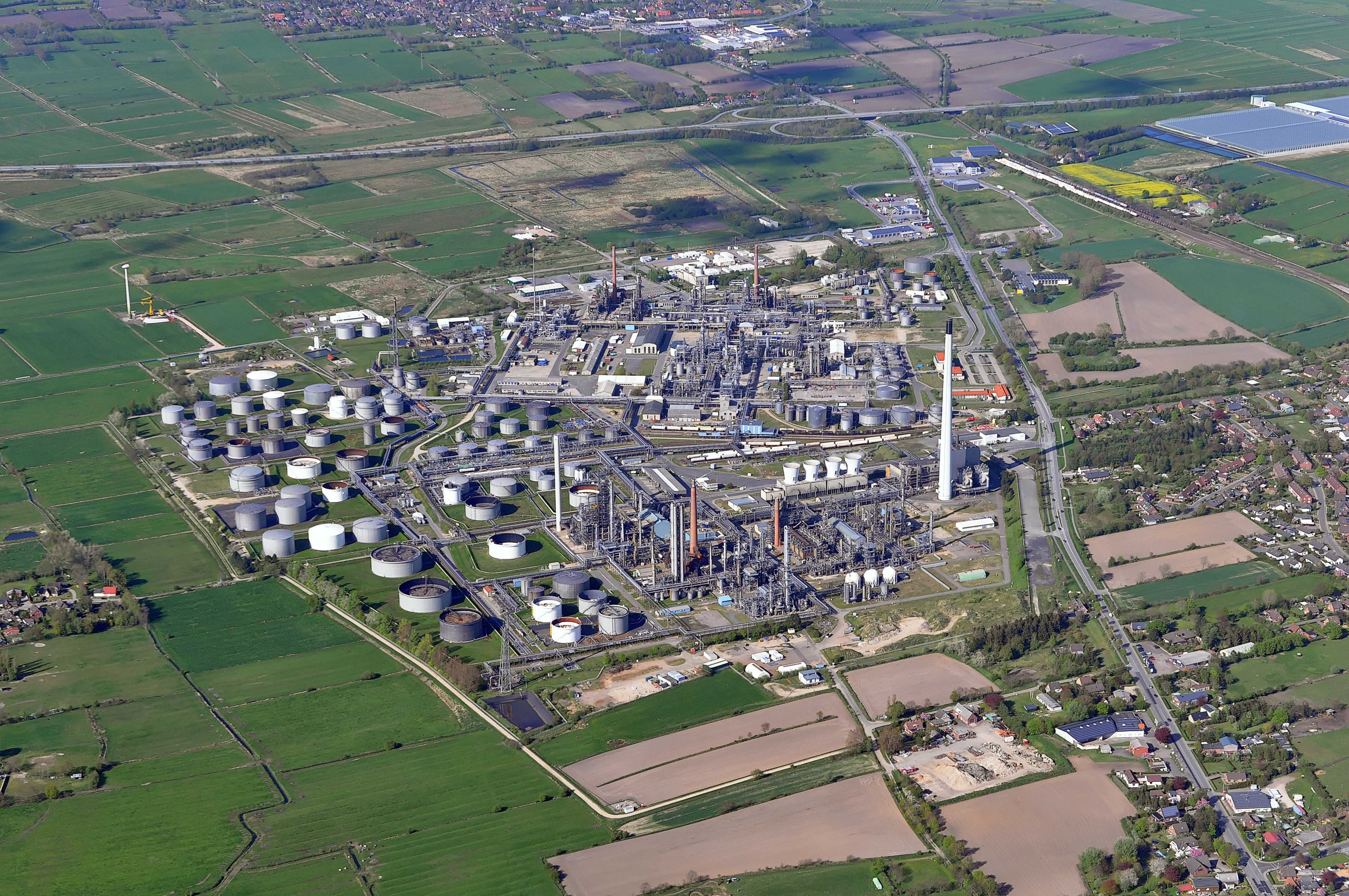 Luftbilder von der Nordseeküste 2012-05